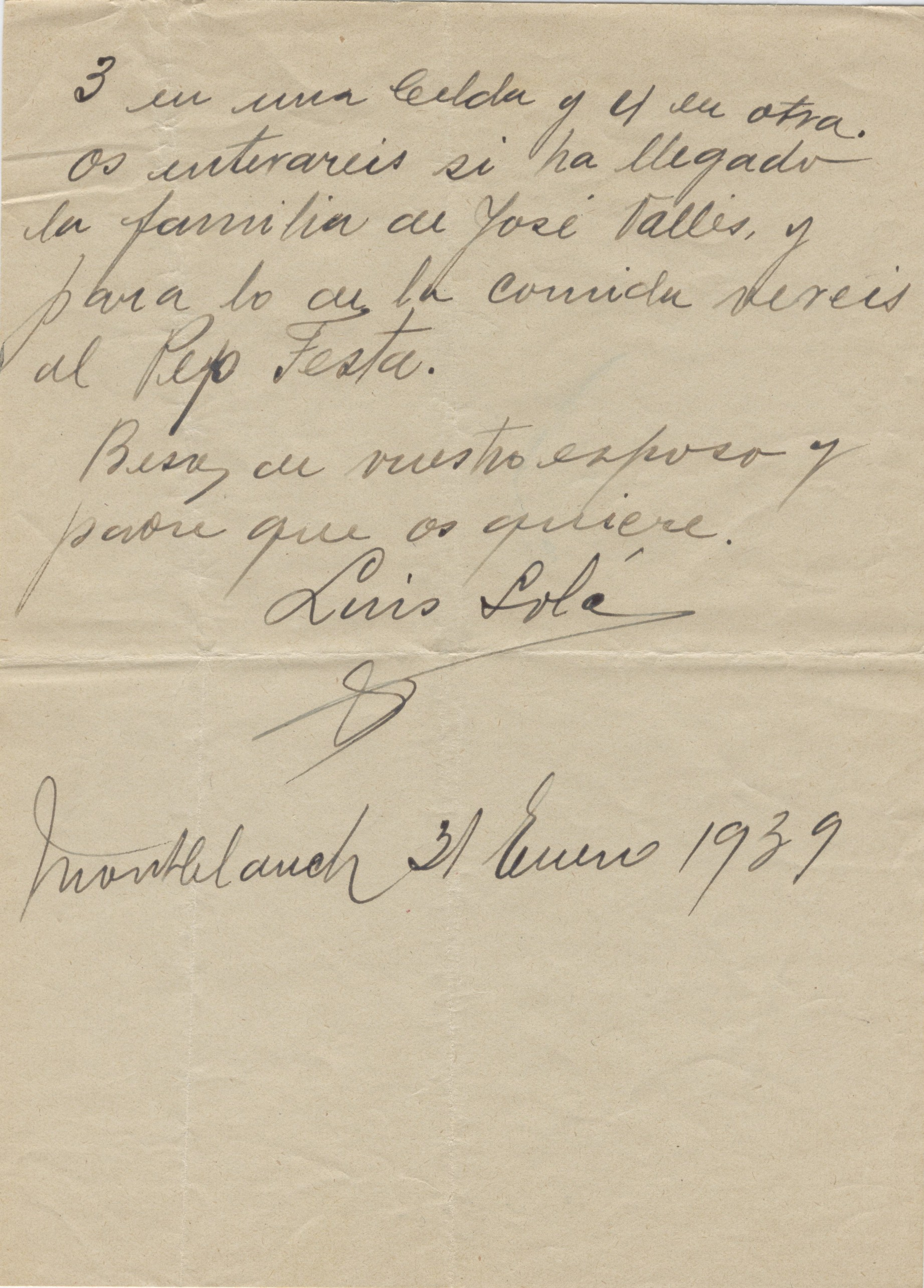 1a carta de Lluís Solà Padró des de la presó de Montblanc.